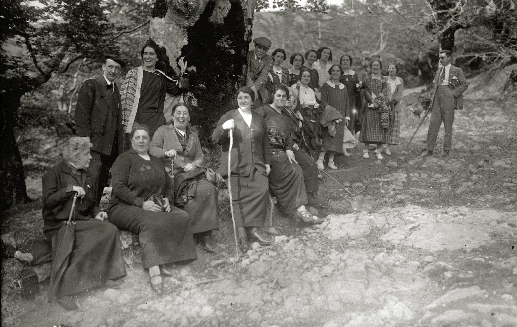 Título original: Celebración de una romería a Arantzazu (10/30) Localización: Azpeitia (Guipúzcoa)